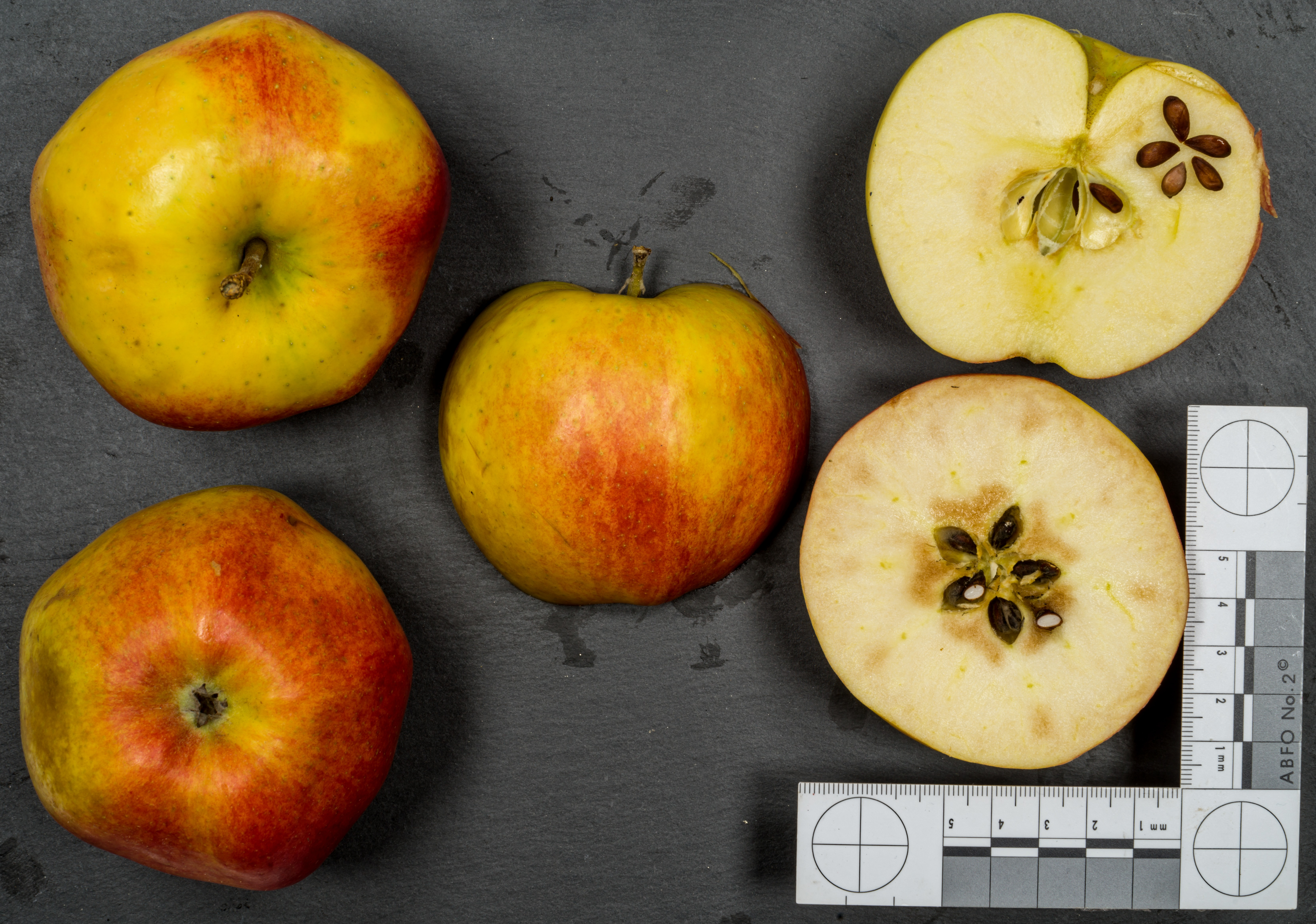 Apfelsorte: Santana 1978 in Wageningen, Niederlande Vielen Dank an den Herzapfelhof Lühs in Jork, Altes Land, Deutschland für die freundliche Unterstützung